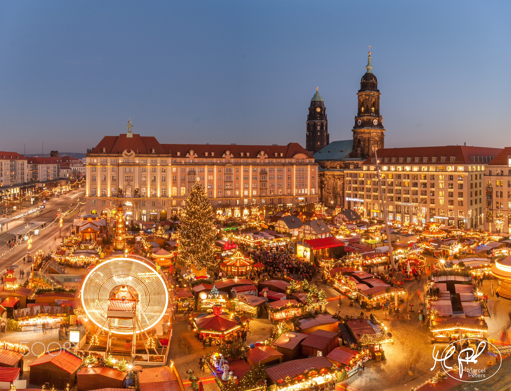 500px provided description: A few inspiring pics of the world famous Striezelmarkt in Dresden [#winter ,#dresden ,#warm ,#weihnachtsmarkt ,#kunst ,#pyramide ,#markt ,#familie ,#lichter ,#holz ,#weihnachten ,#historisch ,#striezelmarkt ,#kreuzkirche ,#karussel ,#romantisch ,#figuren ,#holzkunst ,#kunstwerk ,#krippe ,#altmarkt ,#handwerk ,#schwibbogen ,#krippenspiel]